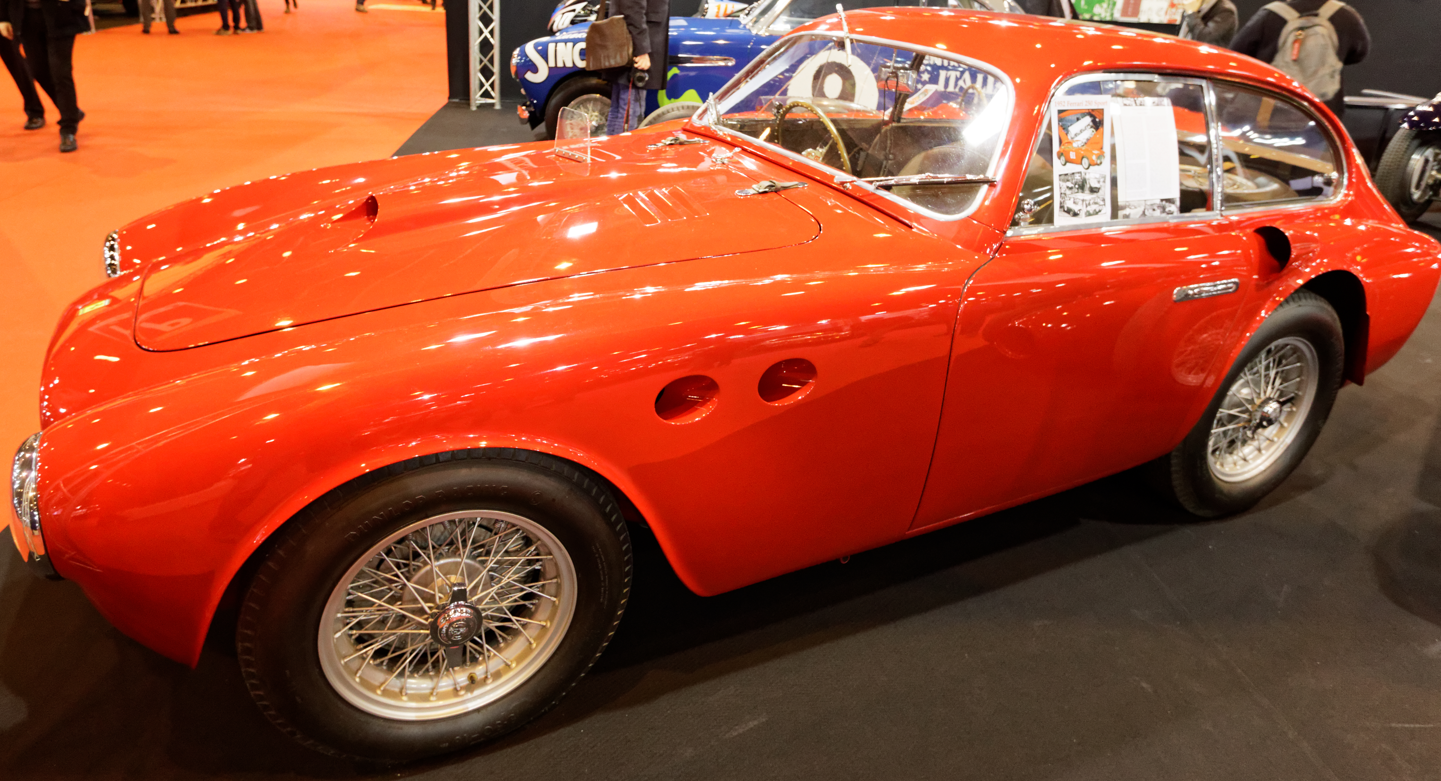 Une Ferrari 250 Sport de 1952 exposée lors du salon Rétromobile 2016.